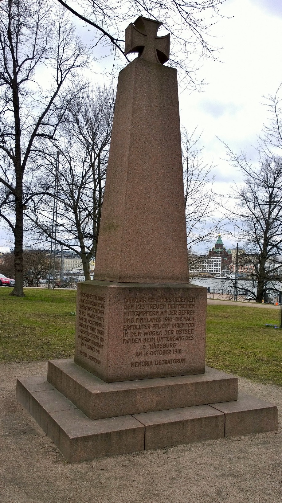 Helsingin Ullanlinnan Tähtitorninmäellä